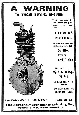 Afbeelding dateert uit 1904, auteur onbekend